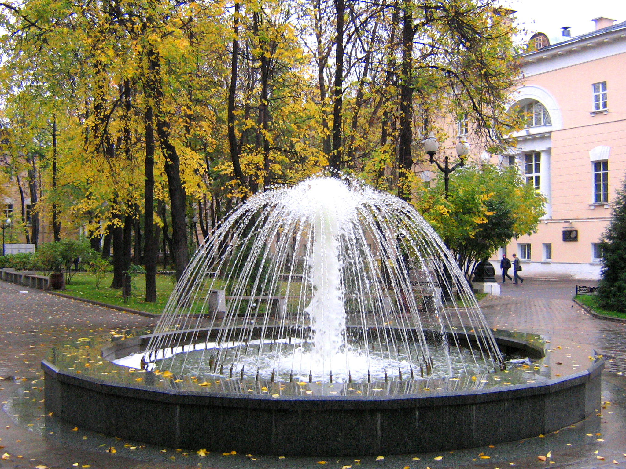 Фонтан во дворе дворцовой части ГУК МГТУ